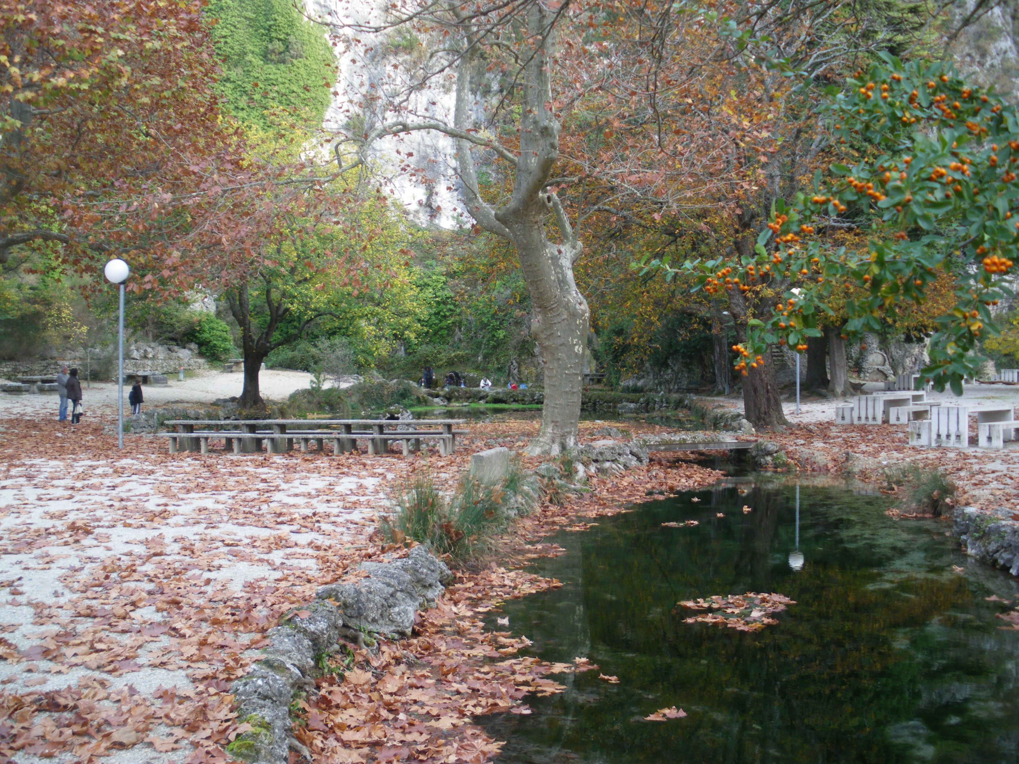 Source du Groseau, rivière du Vaucluse, à Malaucène, France